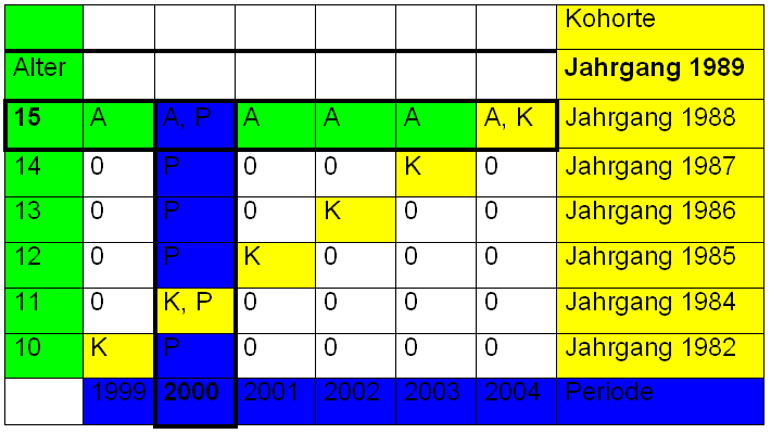 EmpEffekte